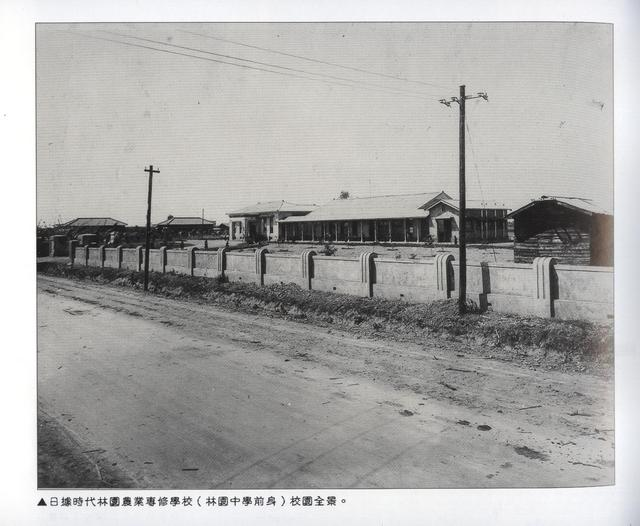 中文（台灣）: 日治時期林園農專（林園高中前身）